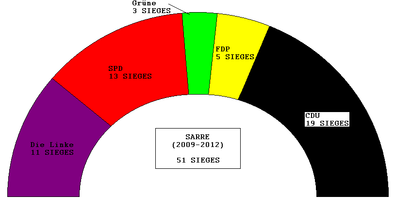 Elus du Landtag de la Sarre en 2009